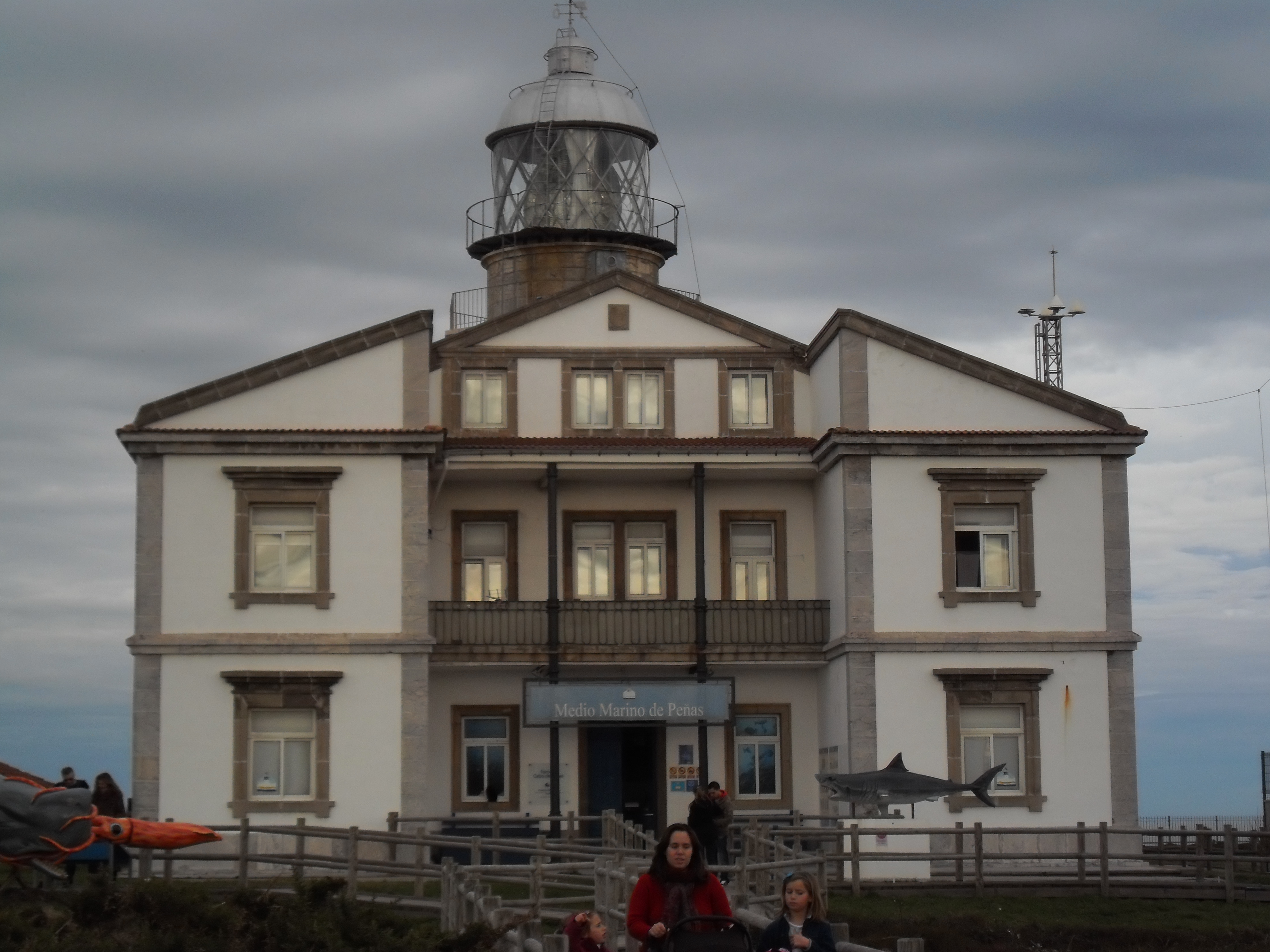 Leuchtturm am Cabo de Penas